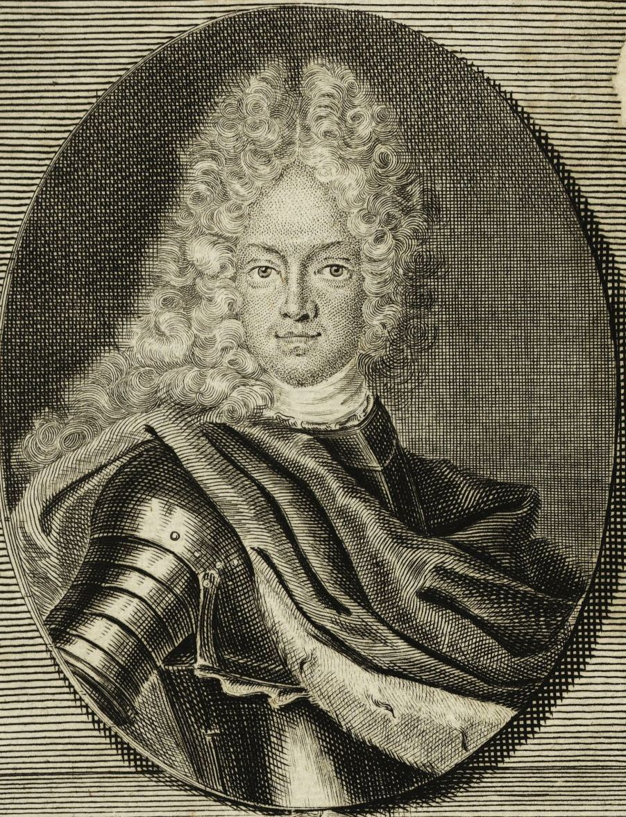 Leopold (Schleswig-Holstein-Sonderburg-Wiesenburg)